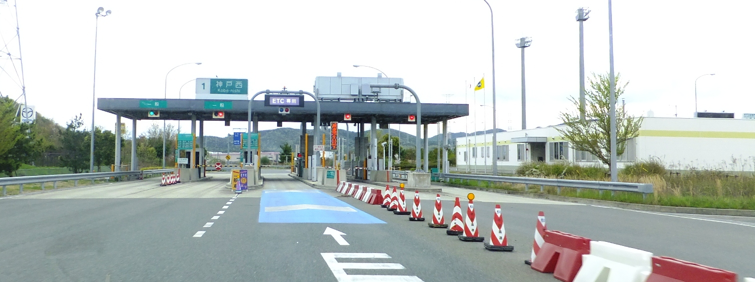 神戸西インターチェンジ